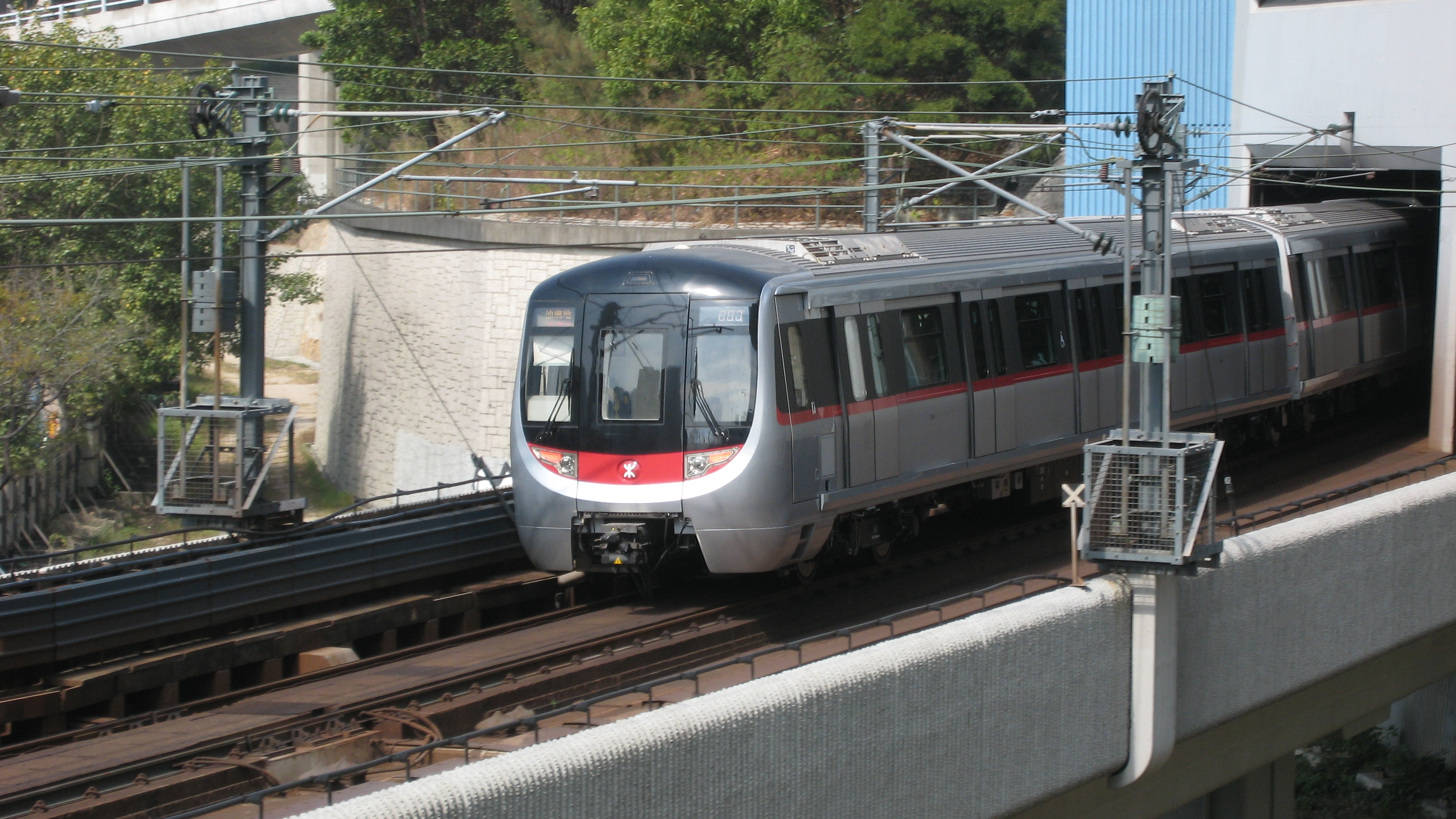 第3編組列車(編號A/C/B 355~356)前往油麻地